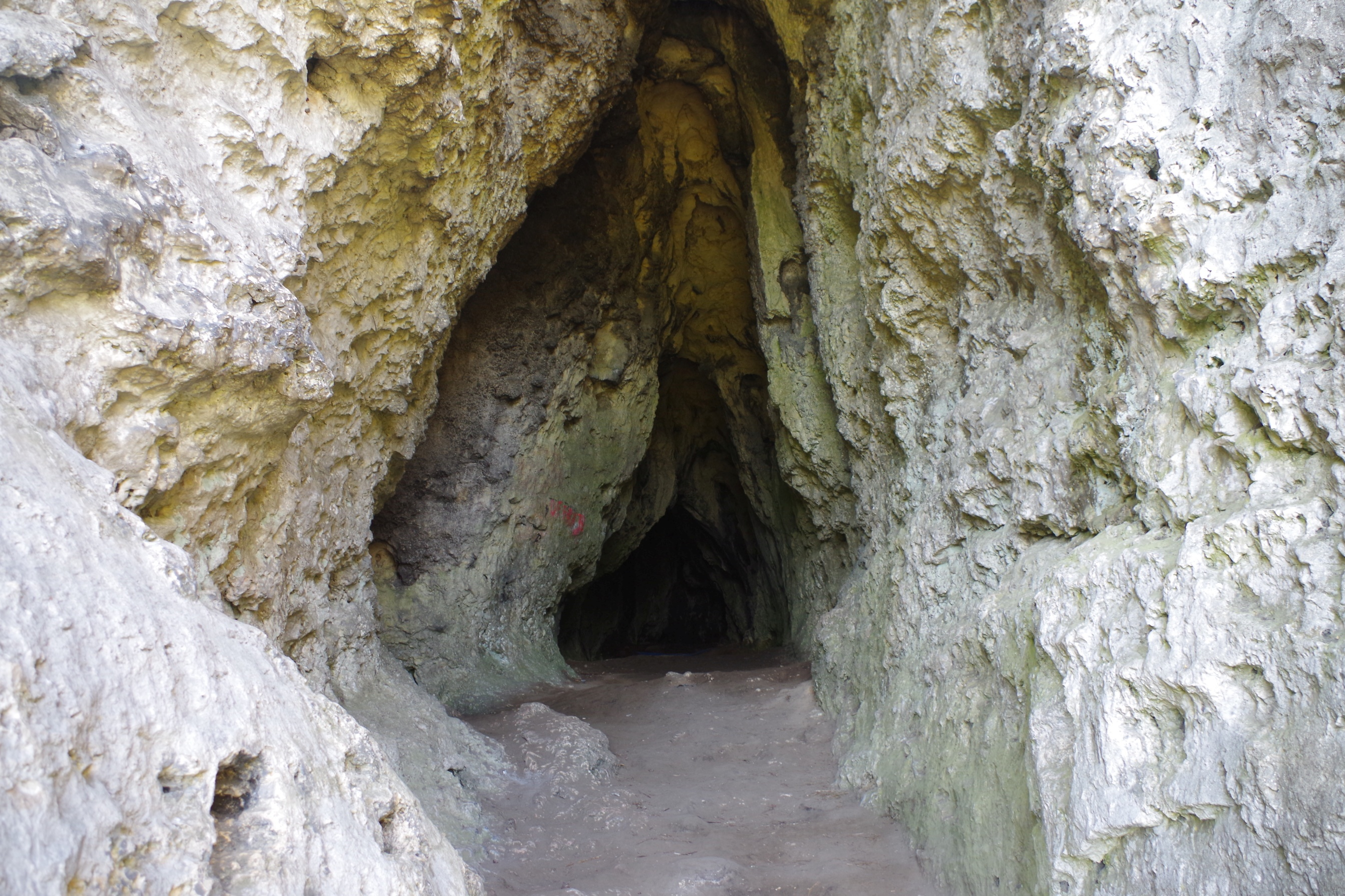 Jaskinia Stajnia